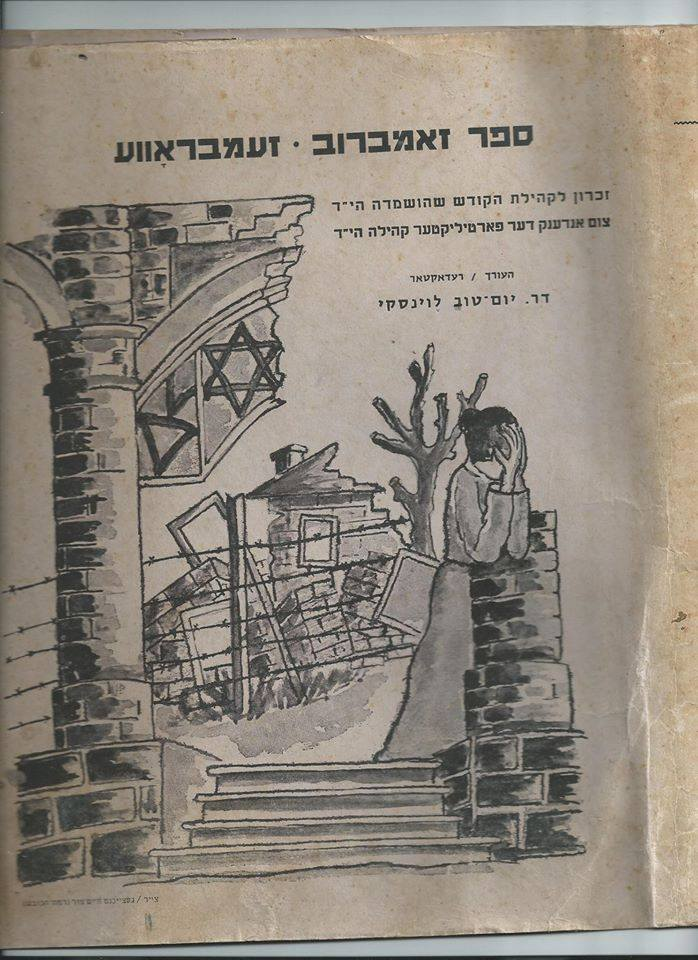 ספר הזכרון לקהילה היהודית בזמברוב שיצא לאור בשנת 1963 על-ידי ארגון עולי זמברוב בישראל. העורך: יום טוב לוינסקי.